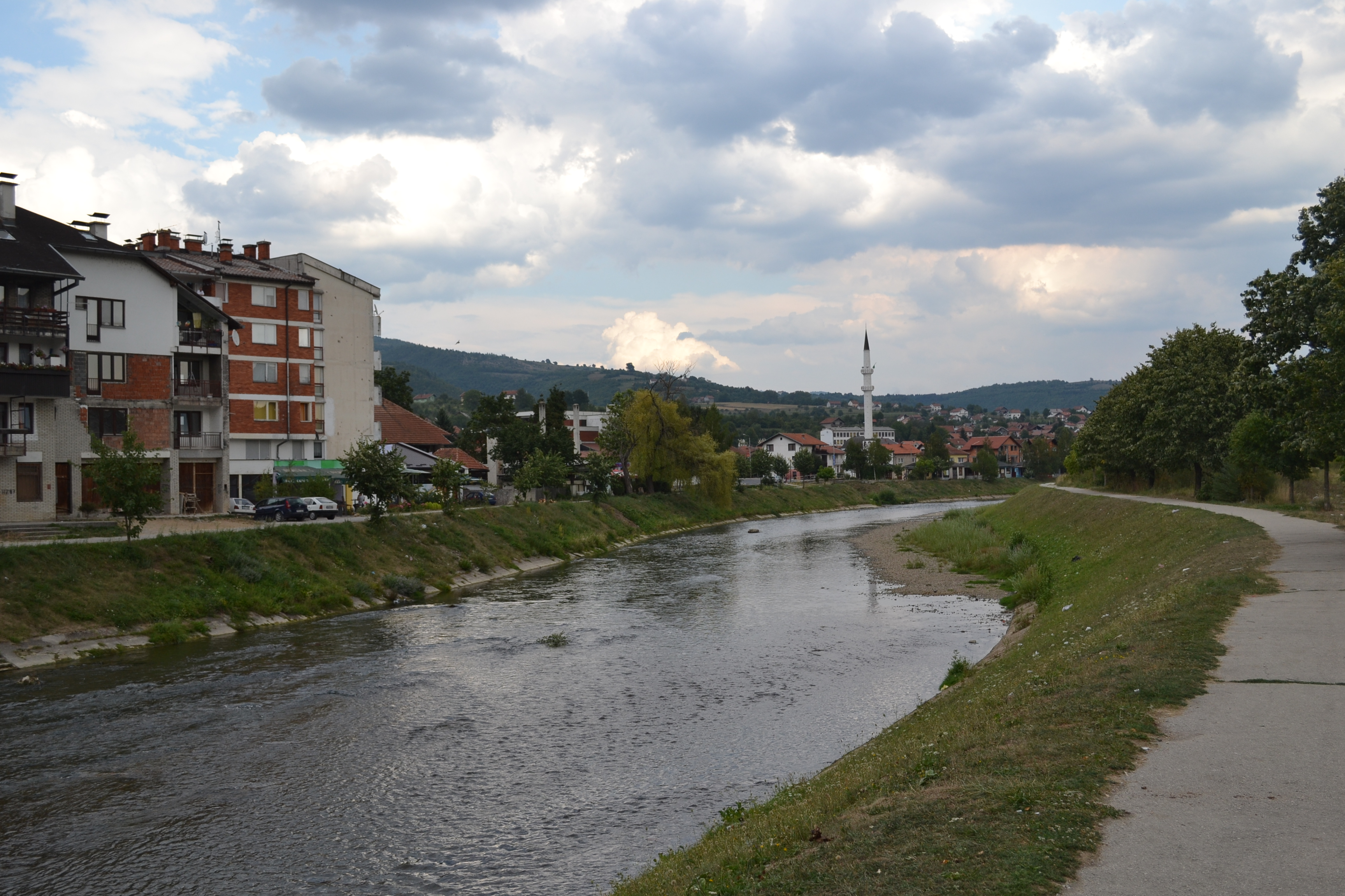 Врбас у Доњем Вакуфу